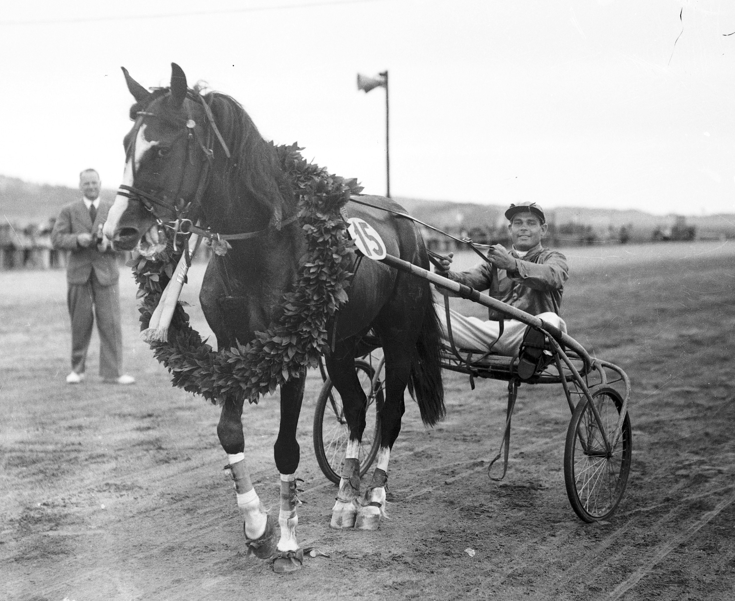 Foto : K75 : Gösta Nordin med Big Noon efter seger på Solvalla 1940.